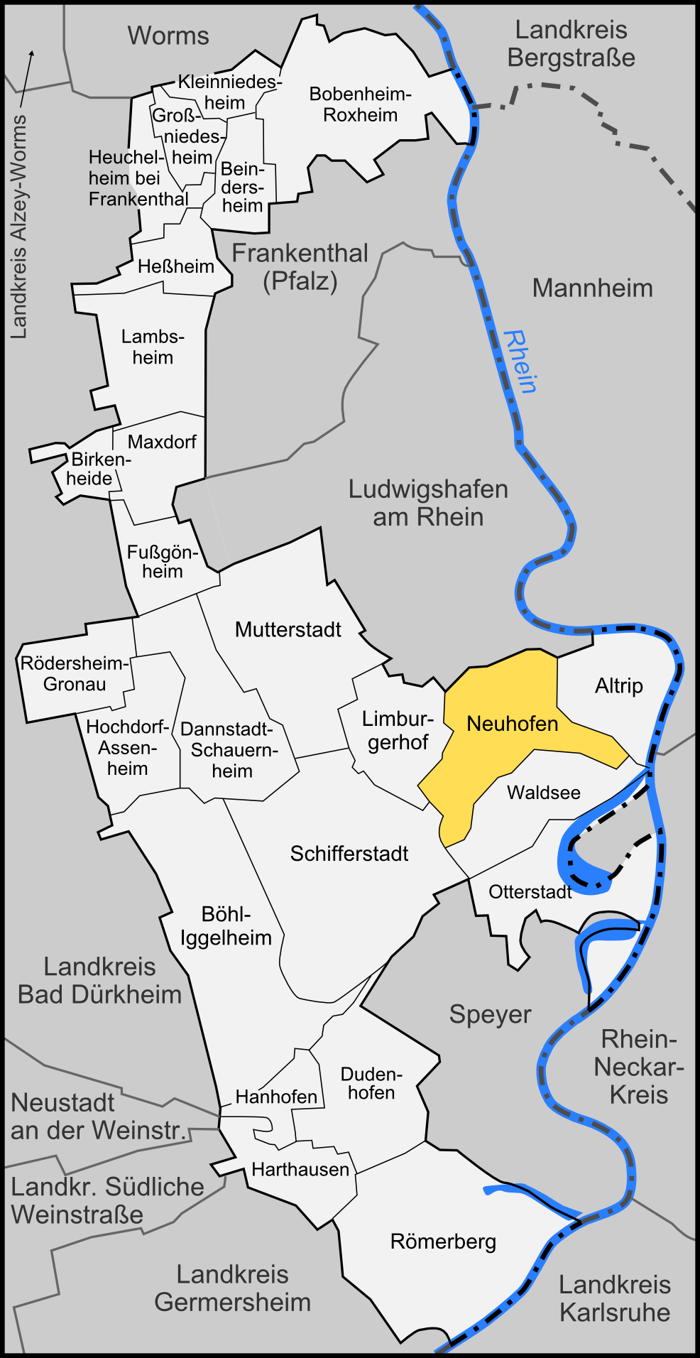 Karte der Gemeinde Neuhofen im Rhein-Pfalz-Kreis